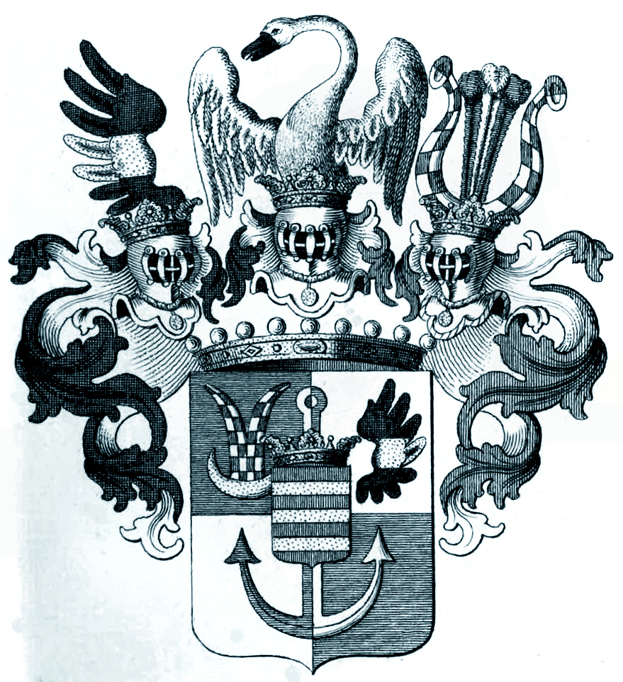 Wappen der (Reichs)grafen von Nostitz und Rieneck 1651